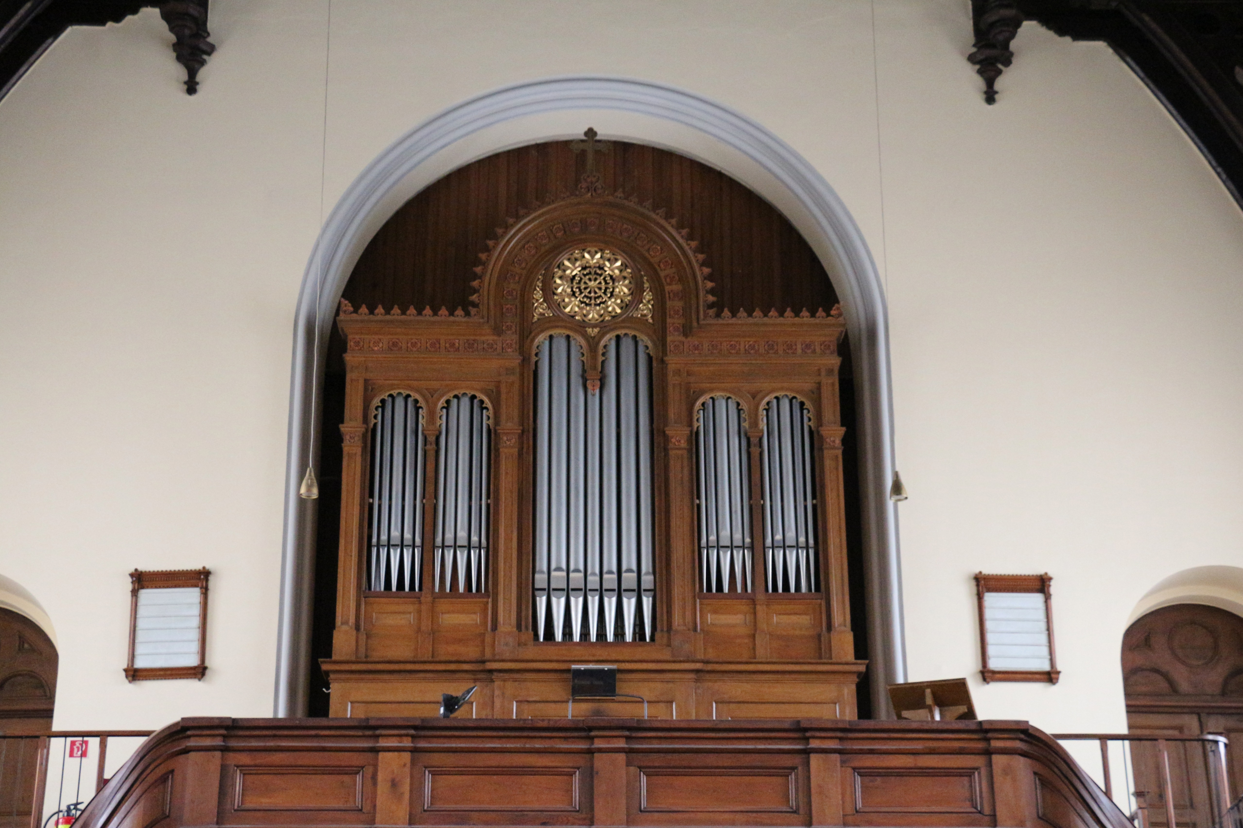 Evangelische Christuskirche, Salzburg, Schwarzstraße; Orgel.